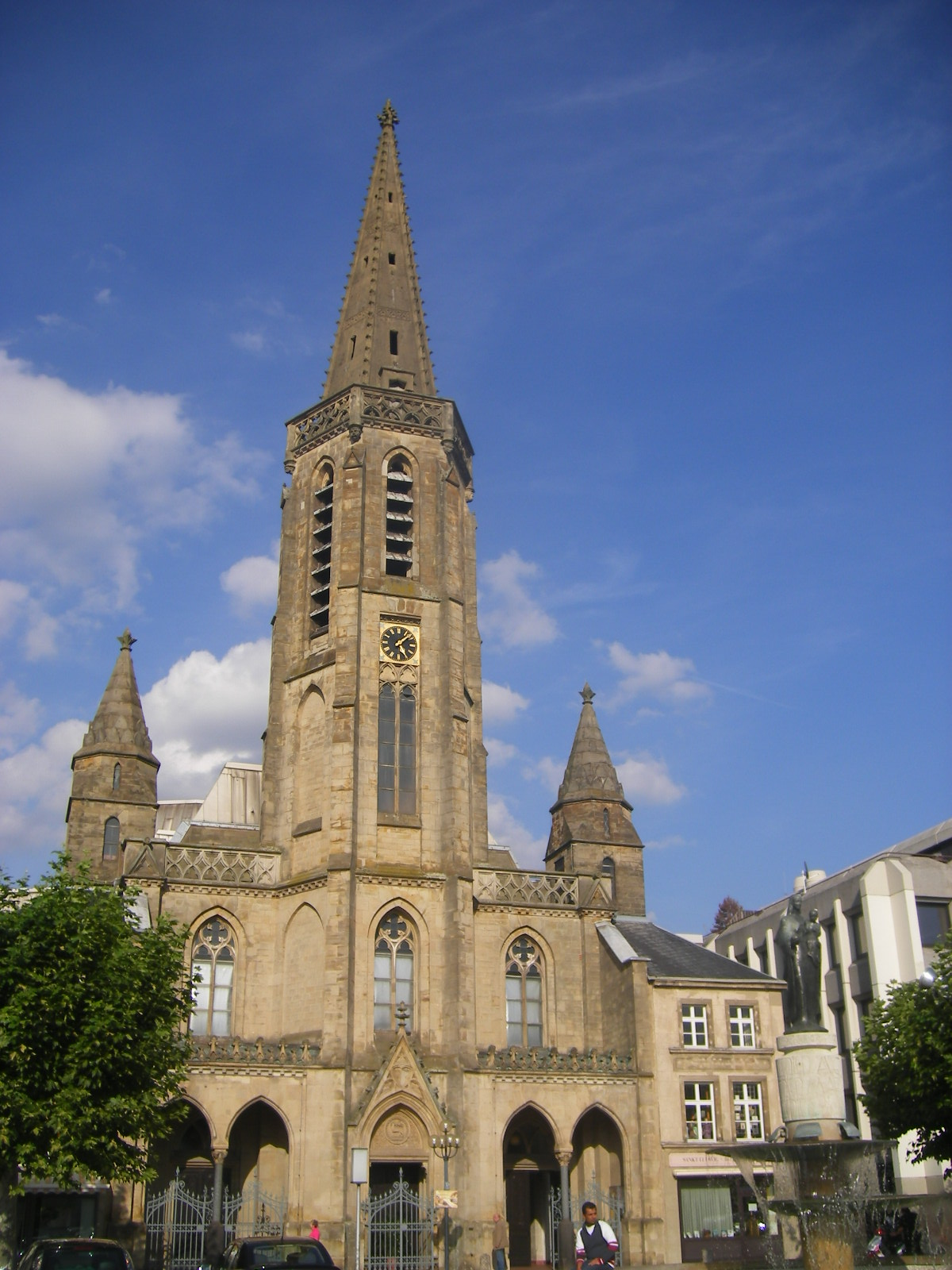 Saarlouis